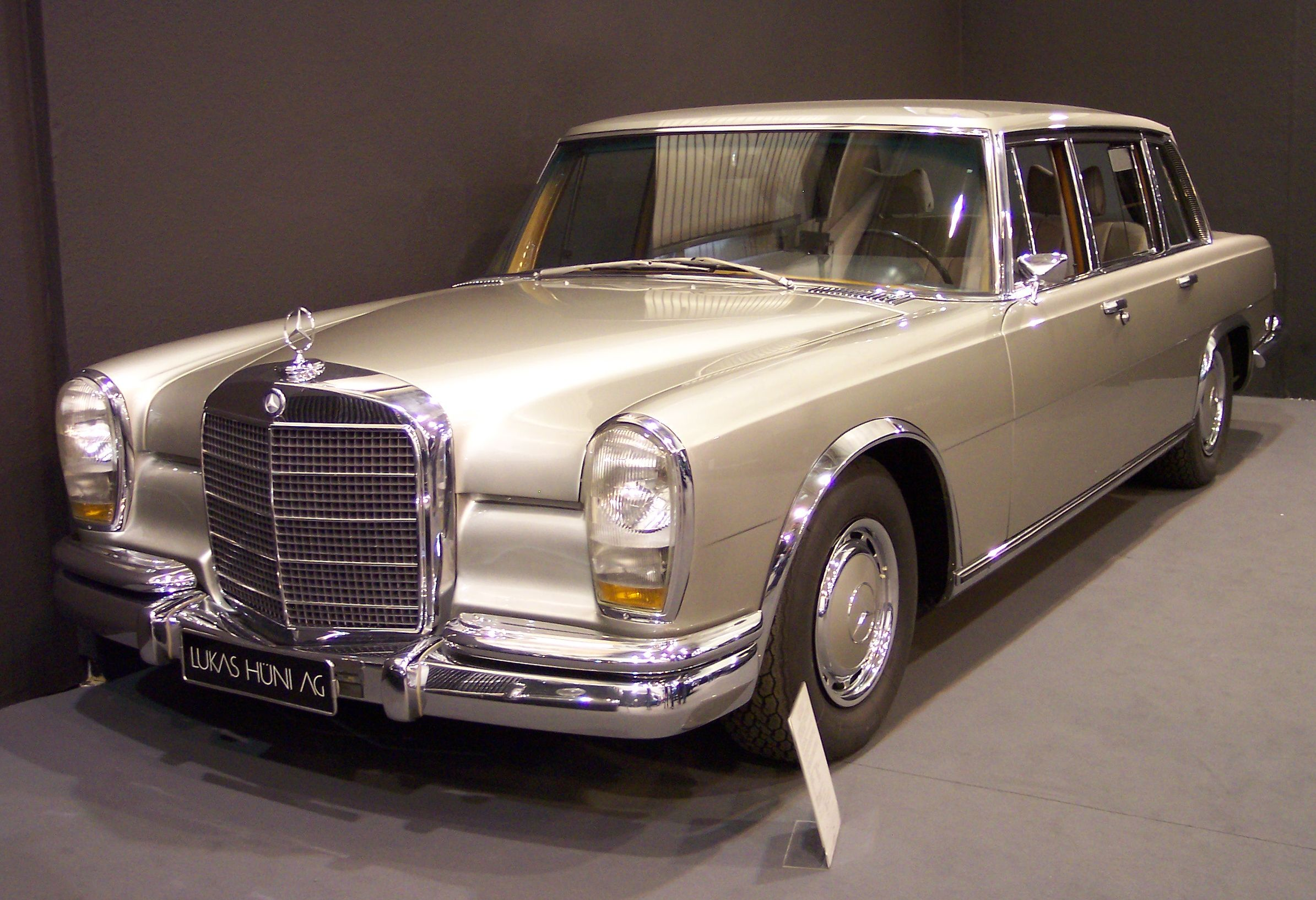 Mercedes-Benz 600 (1963-1978) (Internal Type Mercedes W100)